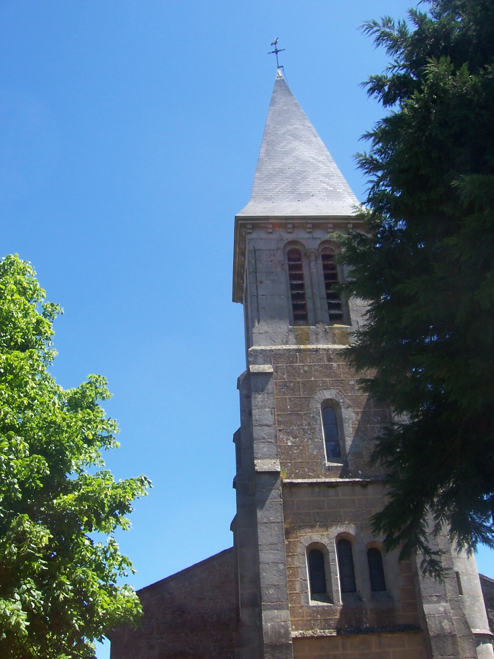 Eglise d'Auxy